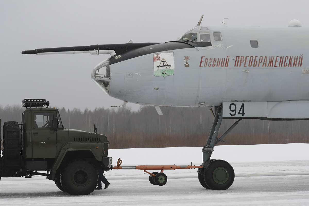 Выполнение плановых полетов на авиабазе «Кипелово»